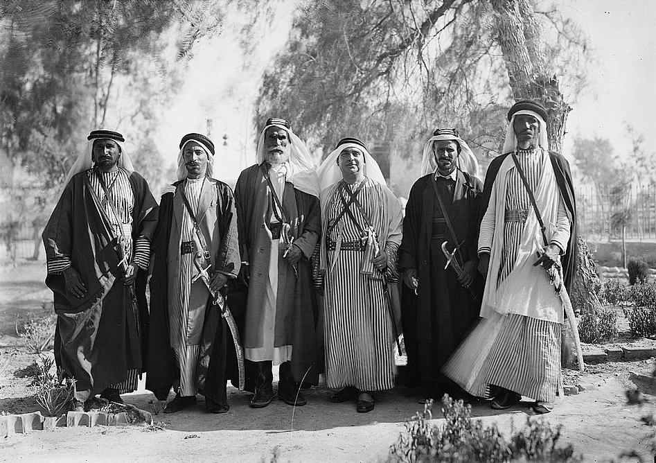 חלק משופטי בית הדין השבטי של הבדואים